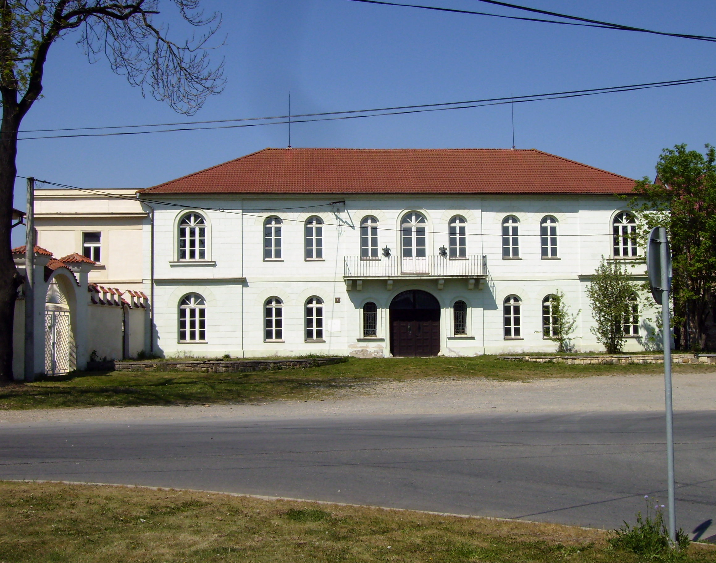 Opravená budova ve Mstěticích u Zelenče.